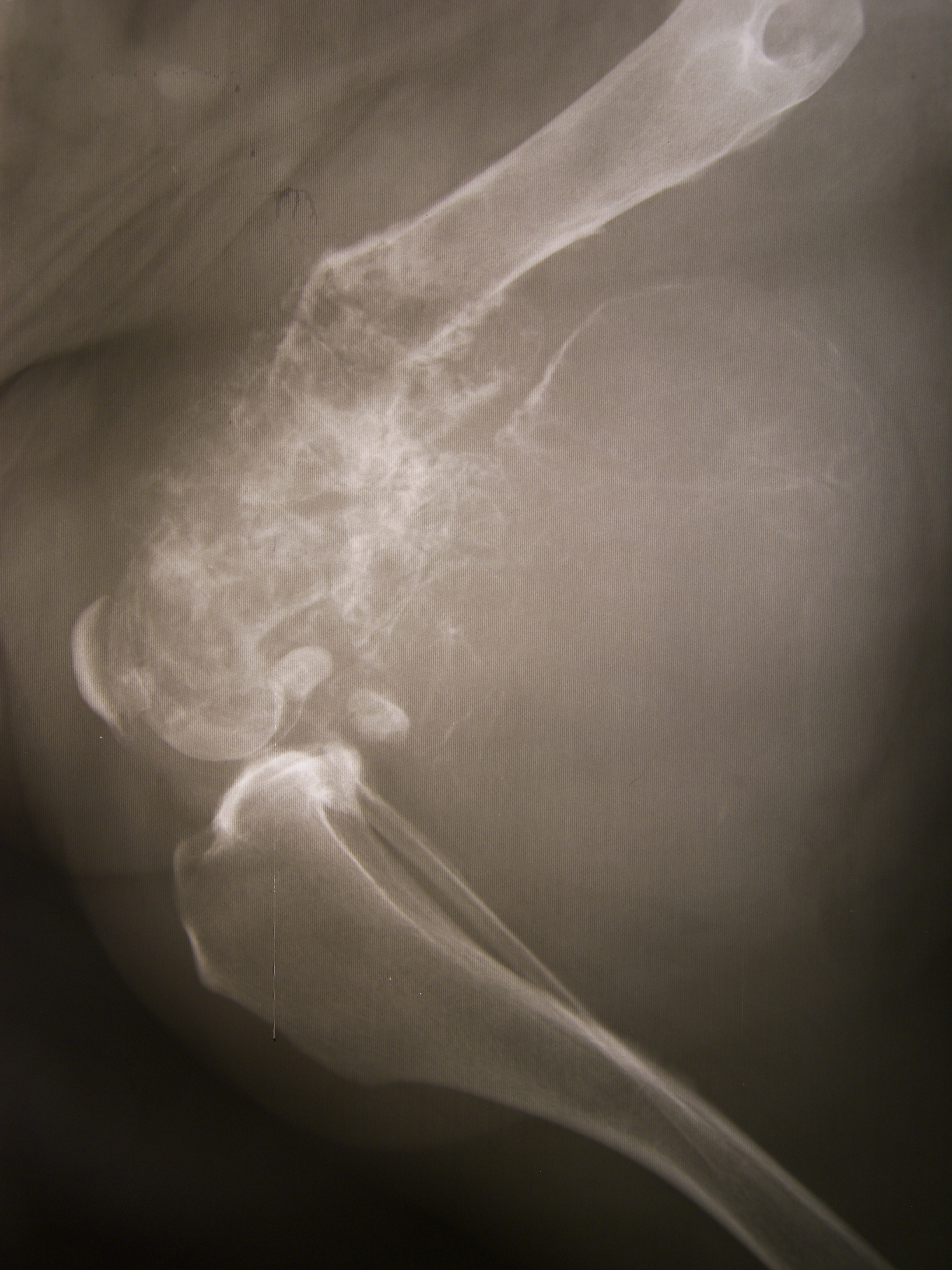 Radio : ostéosarcome